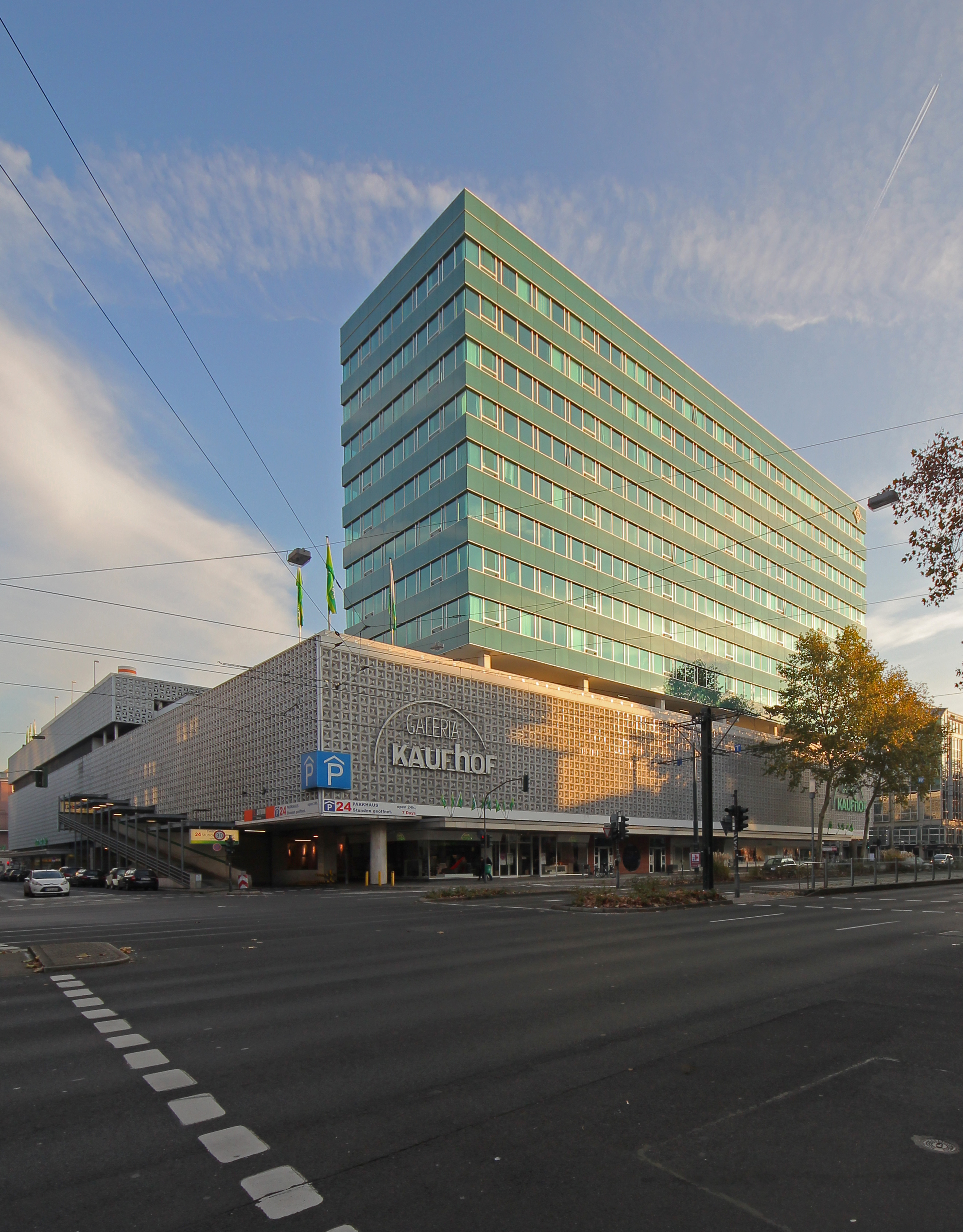 Düsseldorf-Stadtmitte, Galeria Kaufhof mit dem Hochhaus der Verwaltung